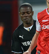 Seyi Olajengbesi in October 2013